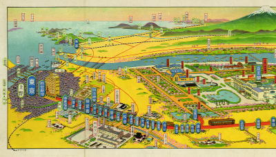 明治大学和泉校舎絵図